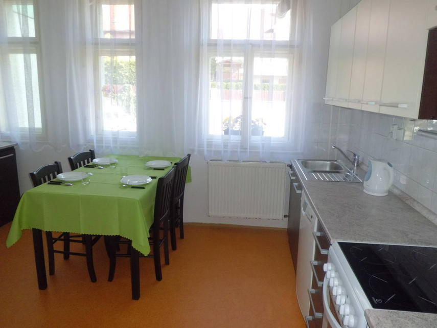 Azylový dům ve Vlašimi, Diakonie Střední Čechy